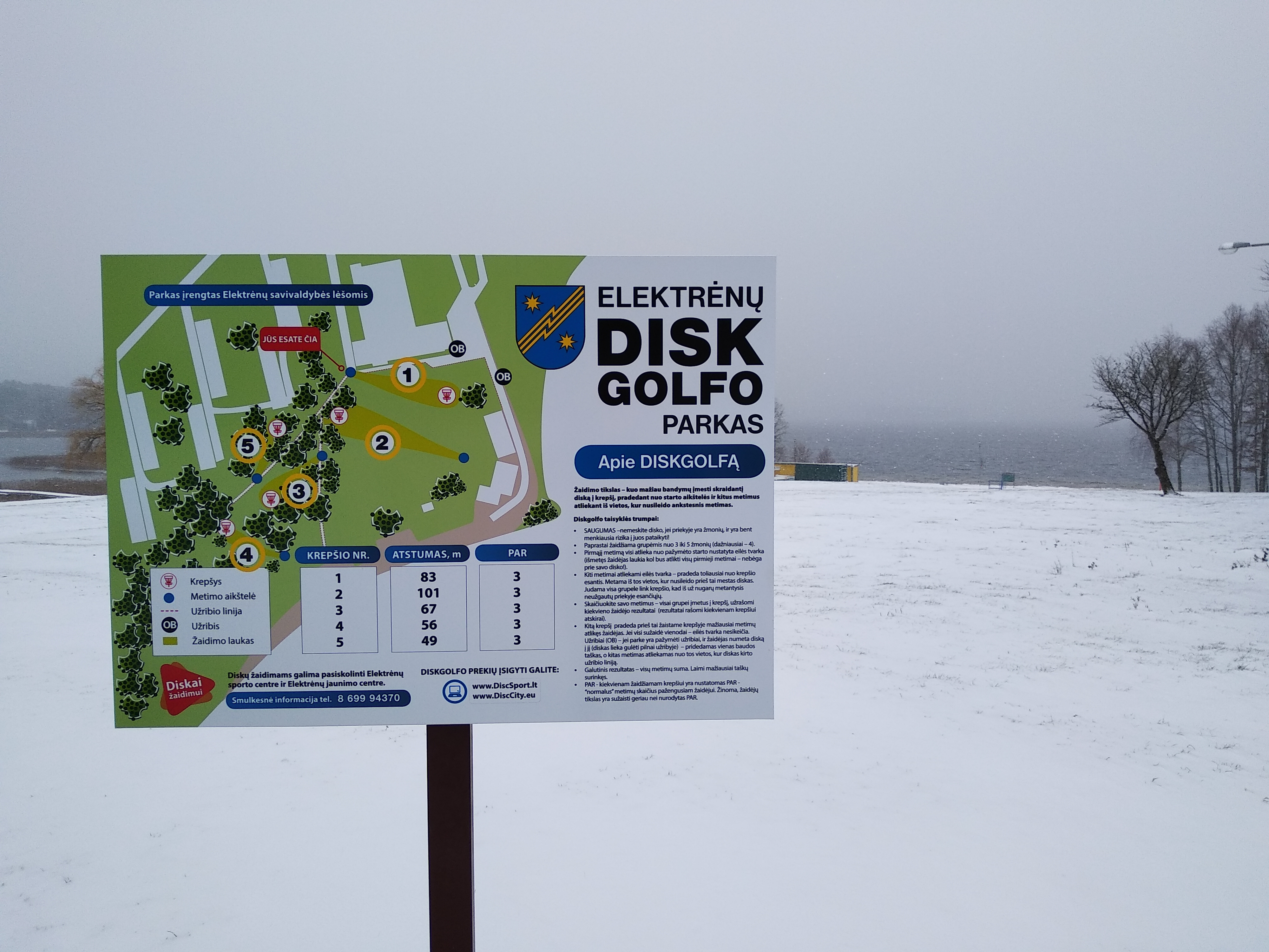 Komentaras